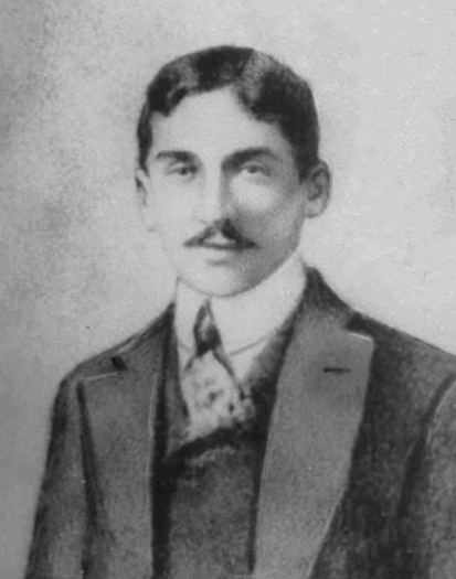 Carlos Pezoa Véliz en Valparaíso, 1905